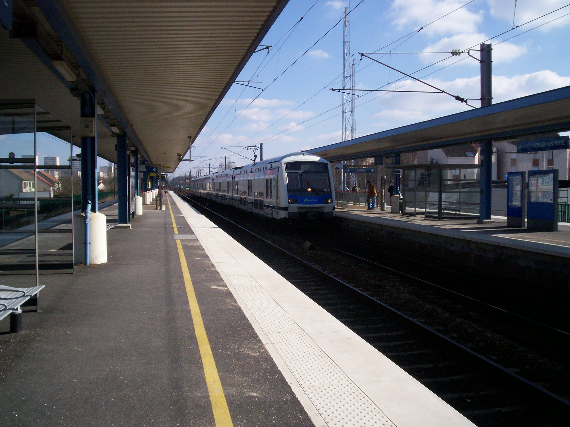 RER E - Gare de Roissy-en-Brie